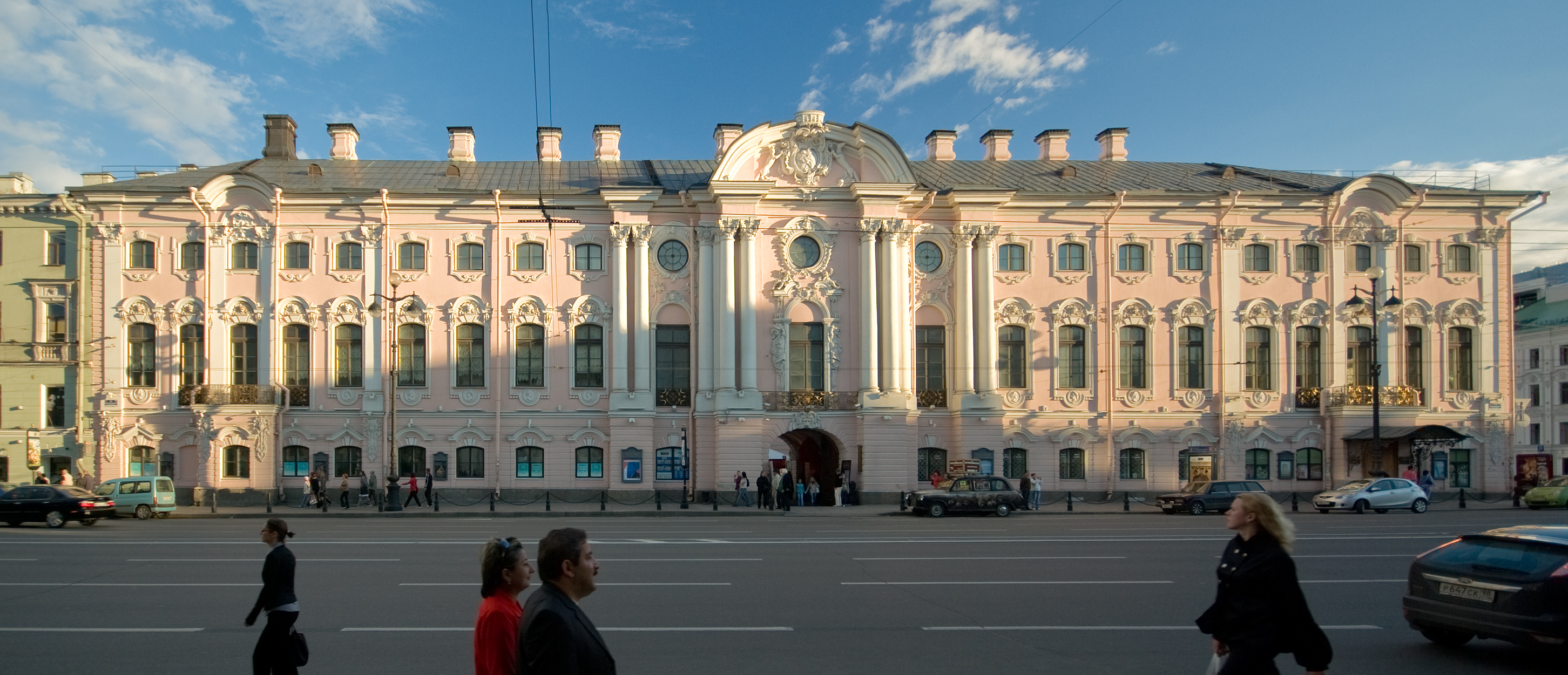 Строгановский дворец, Санкт-Петербург